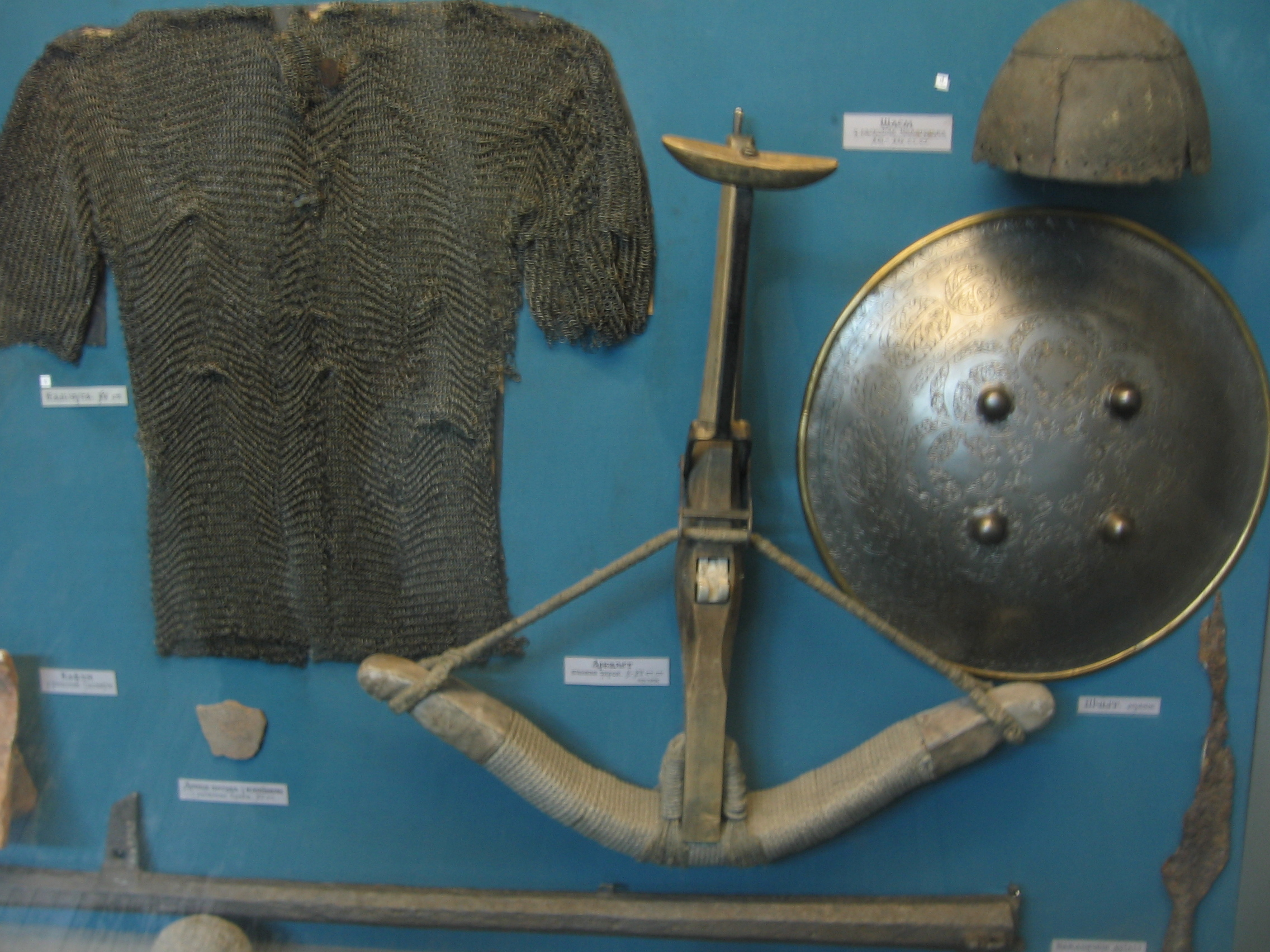 Доспехи. Нац. Истор. музей РБ